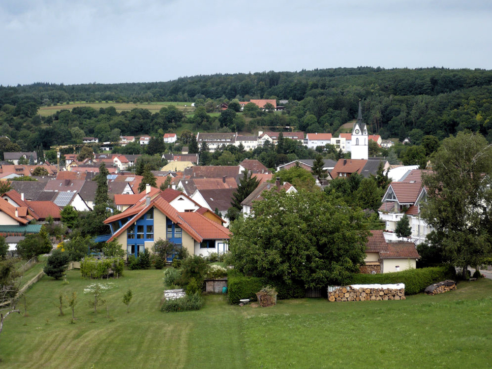 Jestetten, Baden-Württemberg; vom Friedhof Loreto aus gesehen